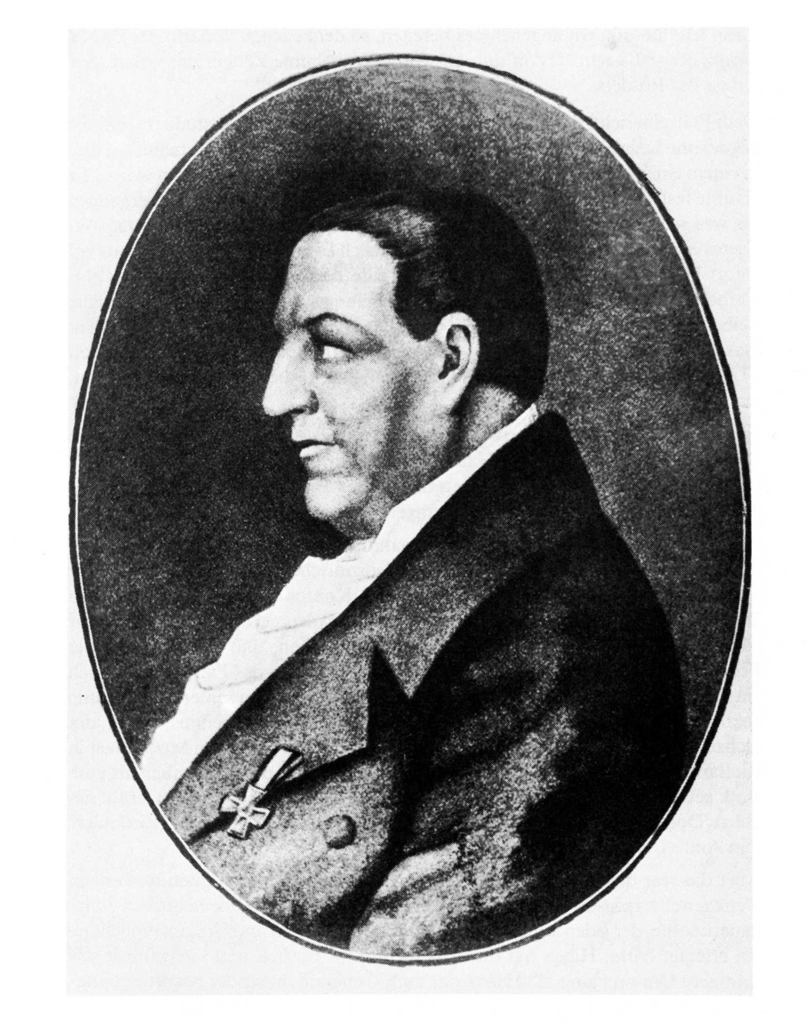 Bildbeschreibung: Friedrich Joseph Haass (1780-1853). Dieses einzig existierende Portrait von ihm wurde heimlich angefertigt.